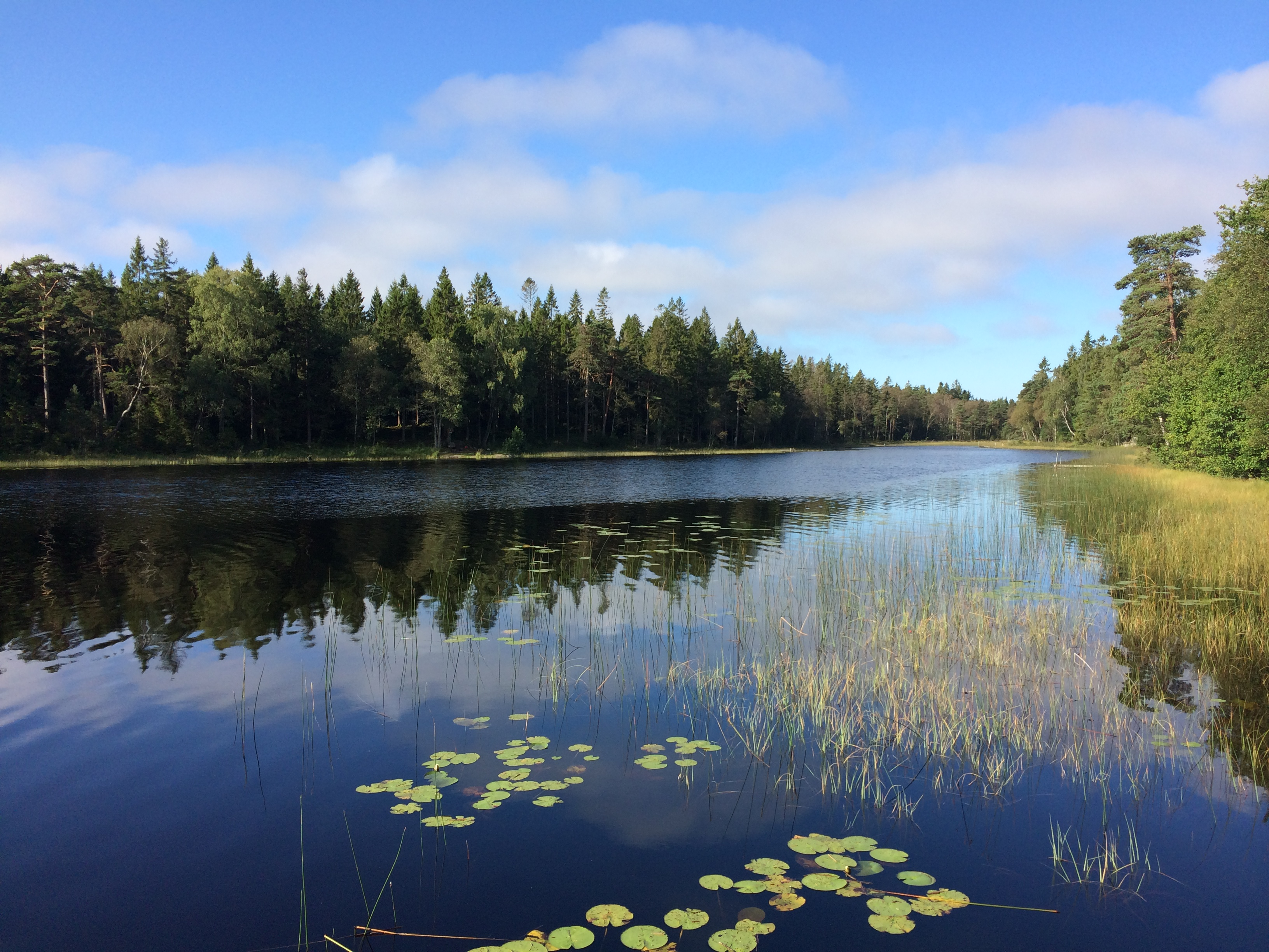 Hallsjön, Halleberg